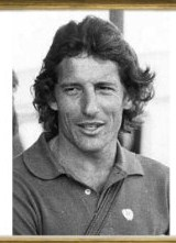 (1948-2008) jogador e treinador de futebol